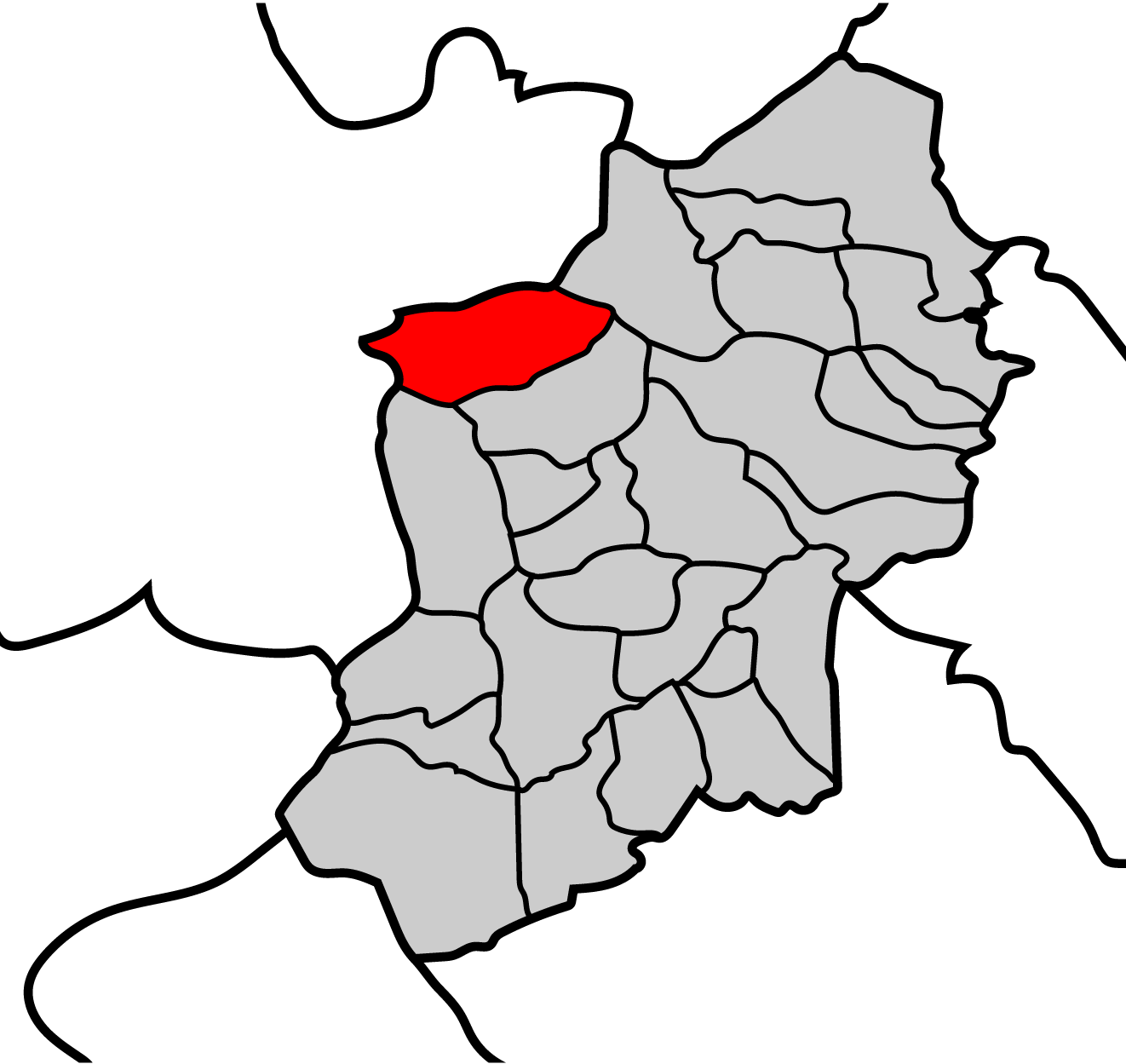 Mapa de la parroquia de Cascallá ayuntamiento de Becerreá